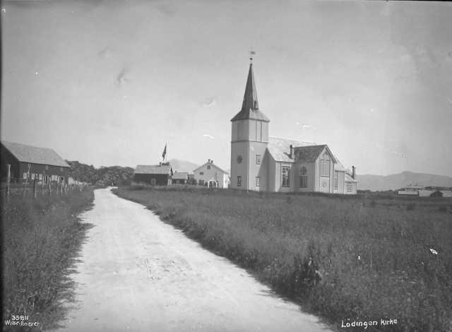 Lødingen Church in 1930, Norway